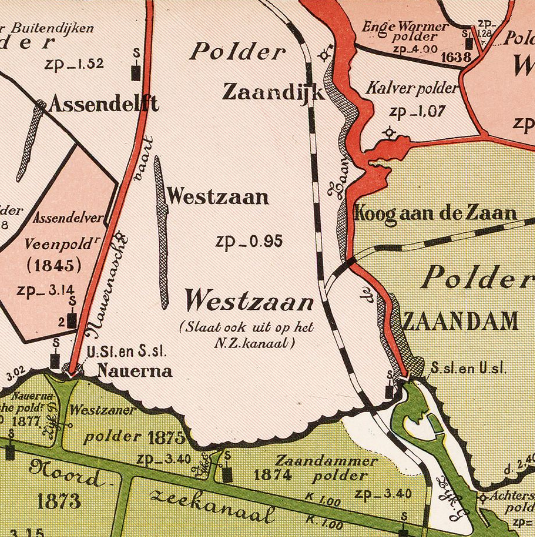 Polder Westzaan